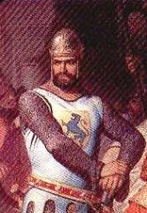 Ausschnitt aus dem Historiengemälde „Kaiser Friedrich Barbarossa und Herzog Heinrich der Löwe in Chiavenna“ von Philipp von Foltz (1805–1877). Siehe :Image:Foltz - 'Kaiser Friedrich Barbarossa und Herzog Heinrich der Löwe in Chiavenna.jpg